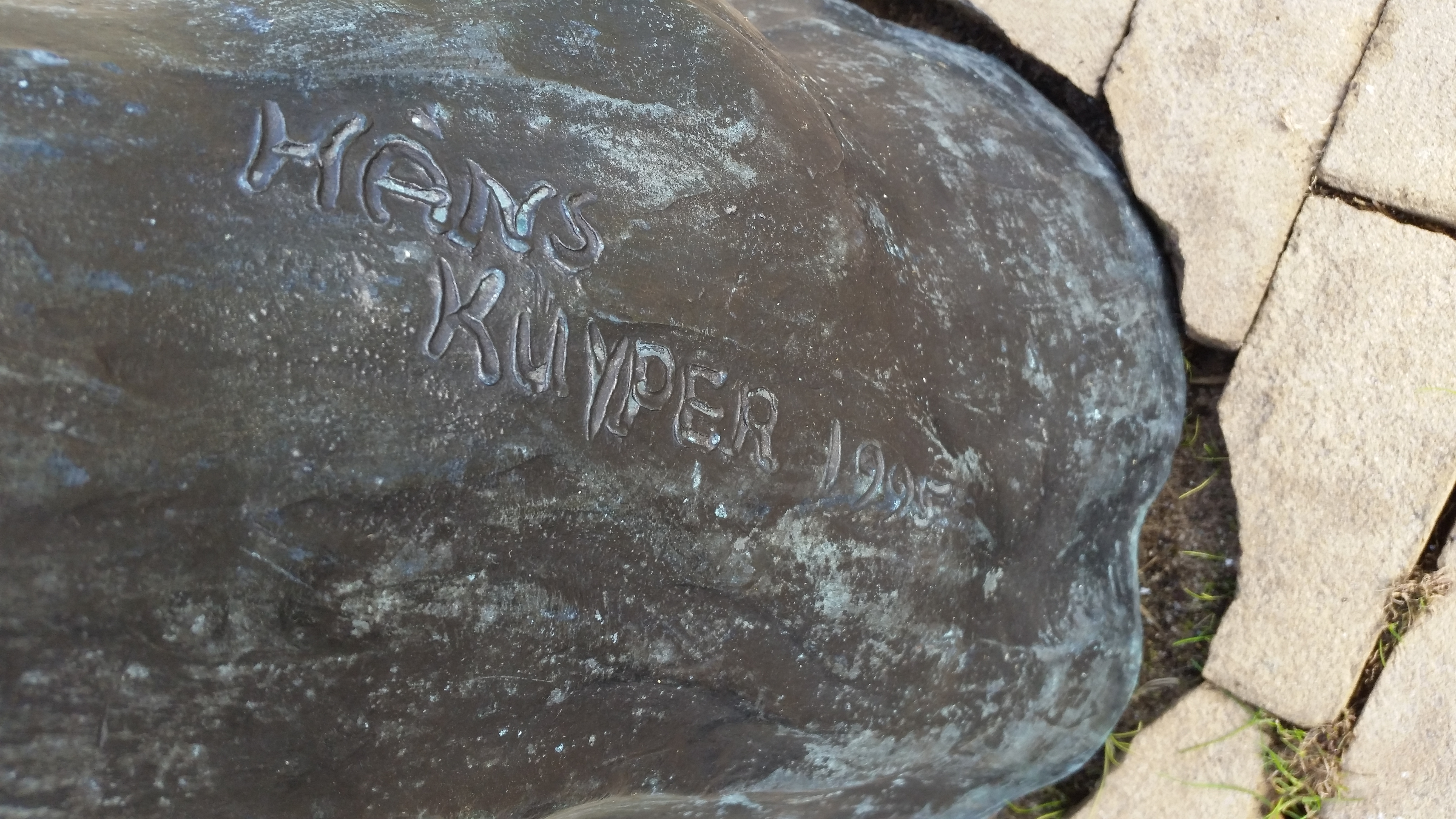 Europa van Hans Kuyper in november 2019